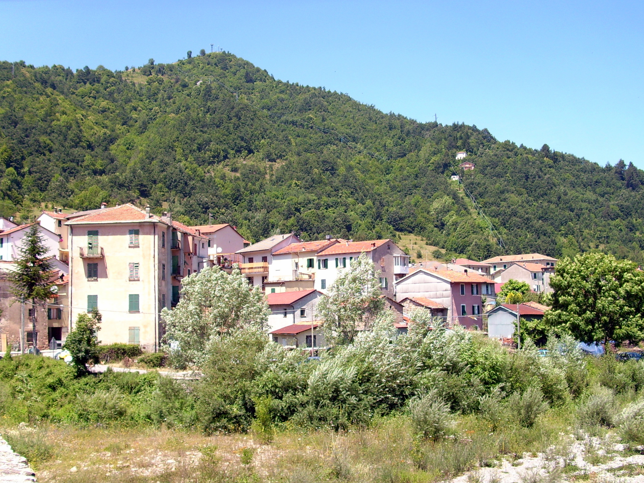 Panorama di Montebruno, Liguria, Italia